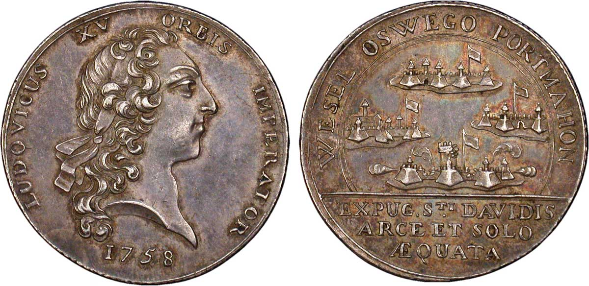 Jeton sur la prise de places fortes lors de la Guerre de Sept ans. Description revers : Vue de quatre fortifications dont les canons de celle au premier plan tirent ; à l’exergue en trois lignes : EXPUG. Sti. DAVIDIS/ ARCE ET SOLO/ ÆQUATA ; à l'avers: LUDOVICUS XV ORBIS IMPERATOR.